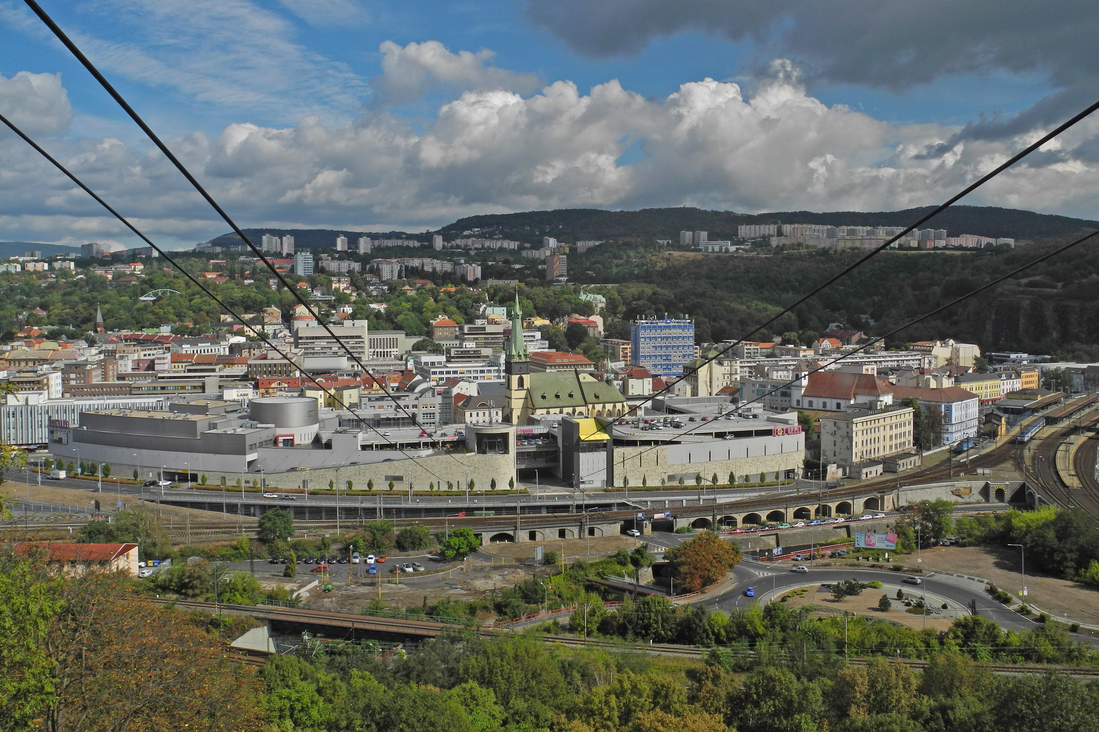 Blick von der Ferdinandshöhe in Aussig (Větruše in Ústí nad Labem) auf die Stadt mit dem Geschäftshaus-Zentrum OC Forum Ústí nad Labem, Malá hradební, U kostela, Bílinská. Architekten: Willem-Joost de Vries, Berton de Bont (2005–2009).